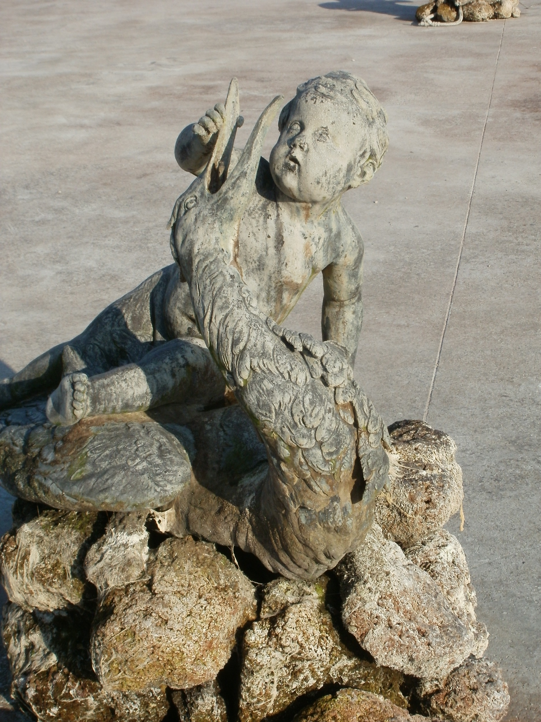 Arionbrunnen (Schwetzingen)